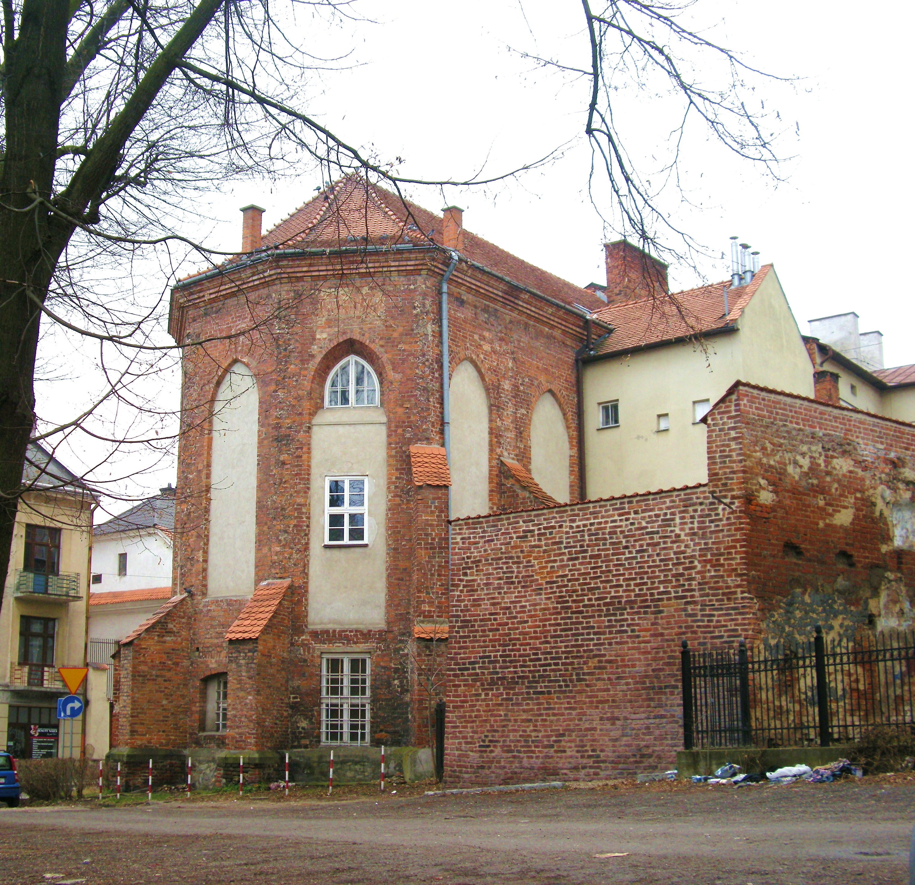 Dawny kościół Bernardynów pw. Matki Bożej Śnieżnej